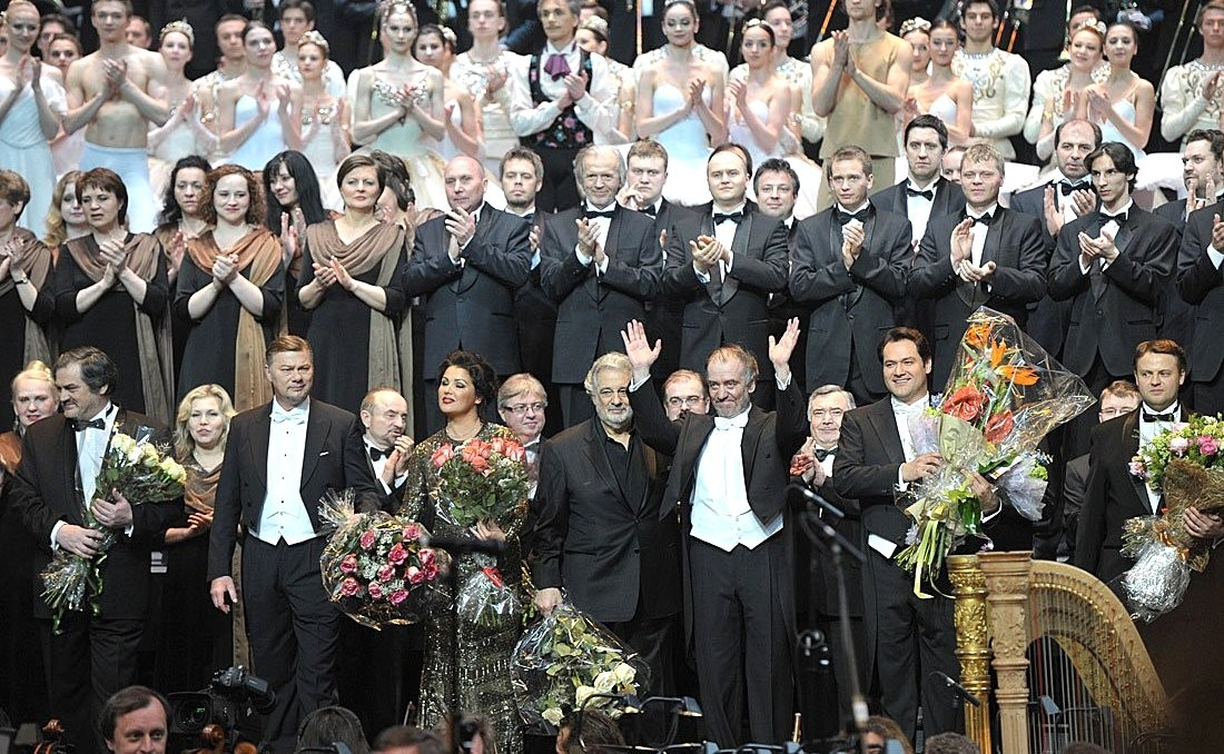 Открытие Новой сцены Мариинского театра